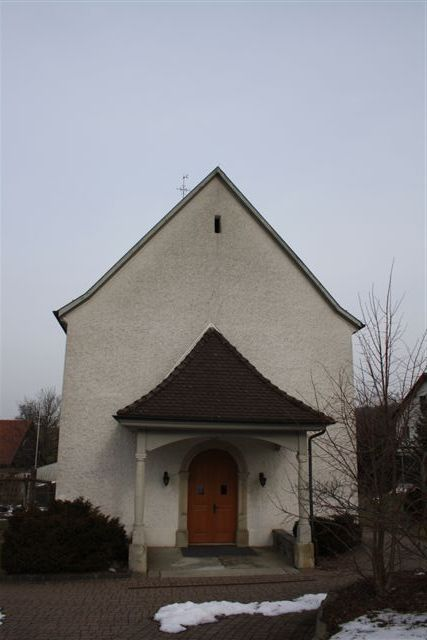 Kapelle in Büttikon, Aargau, Schweiz